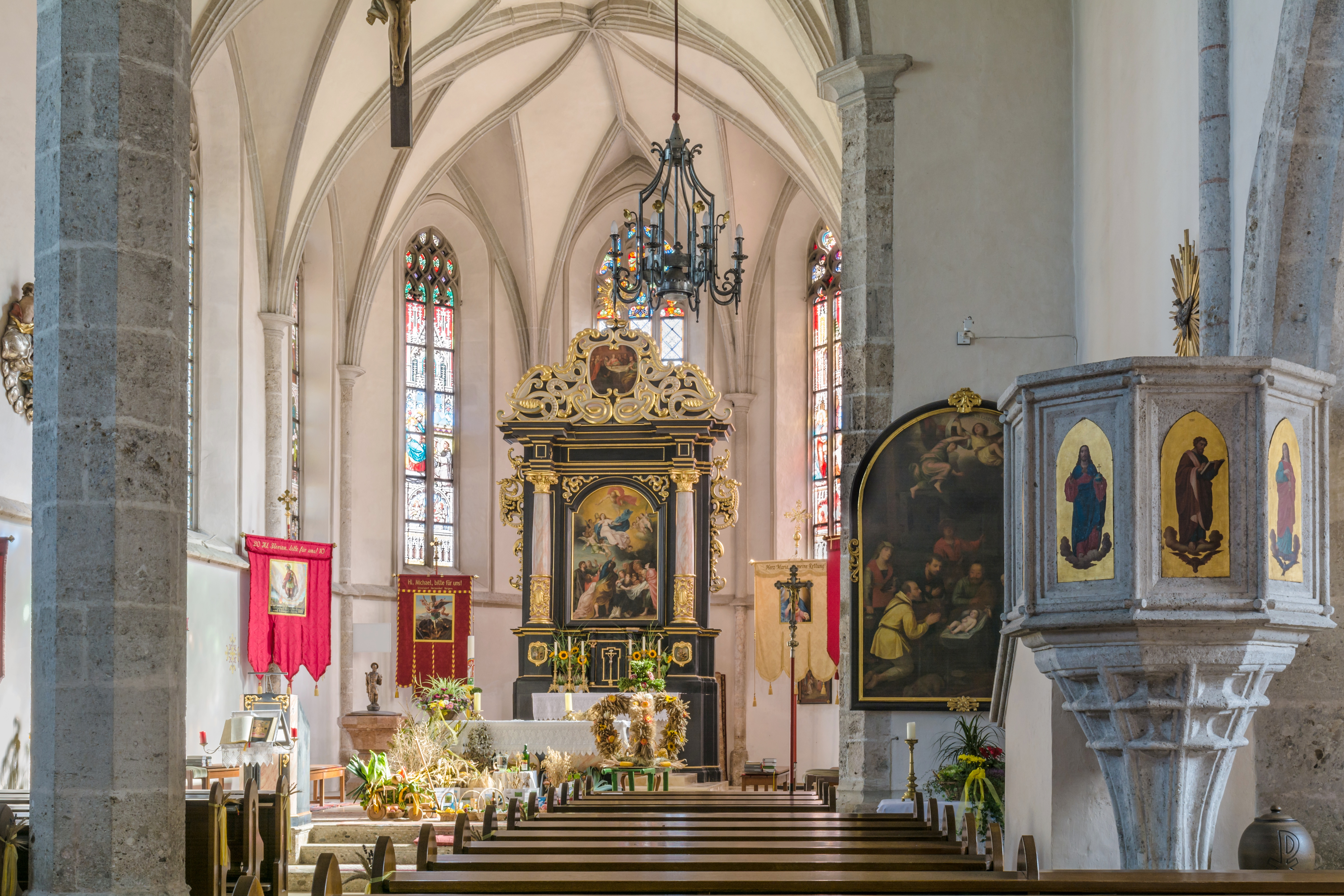 Kath. Pfarrkirche Mariä Himmelfahrt samt Friedhof